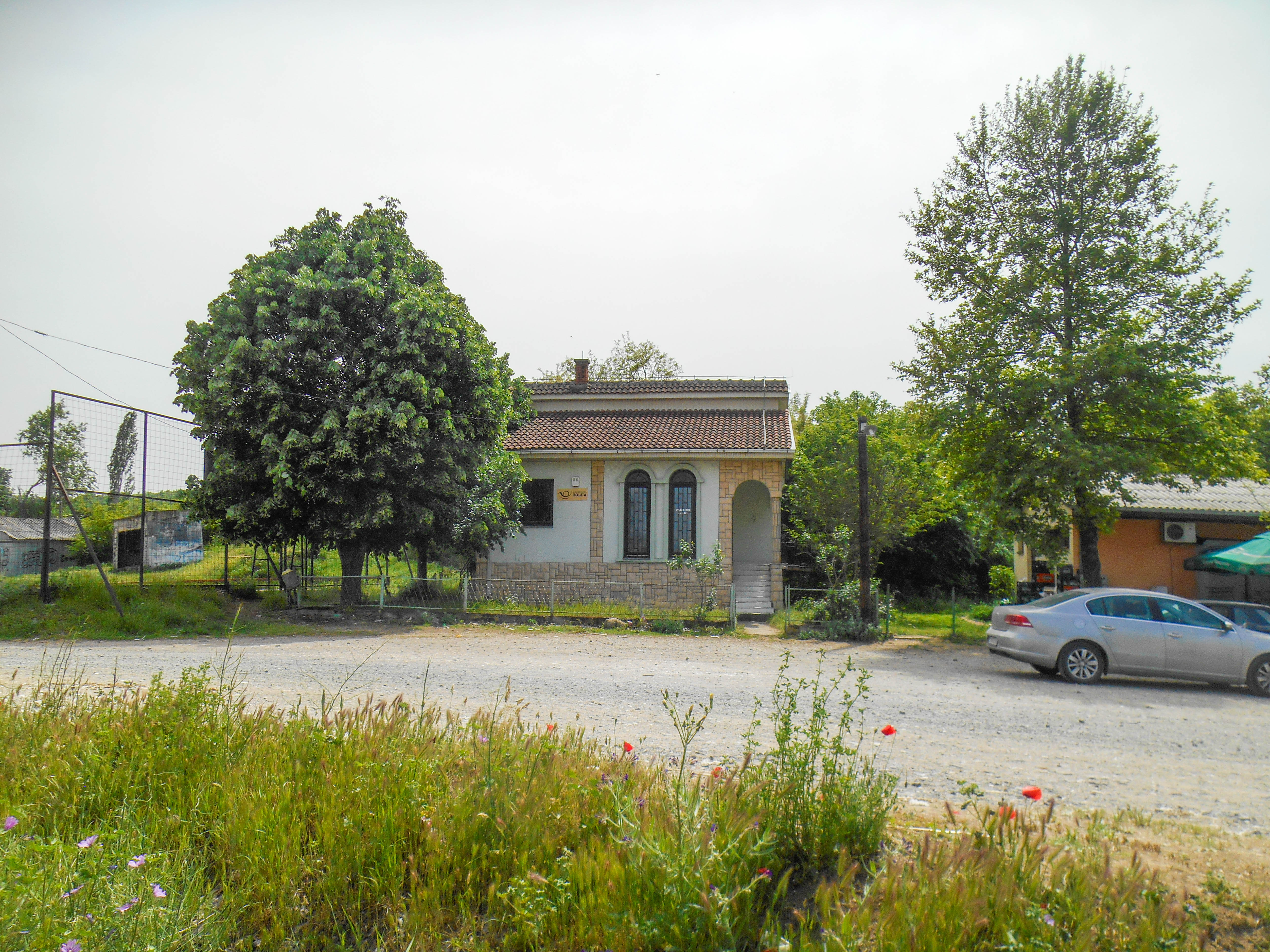 Пошта во селото